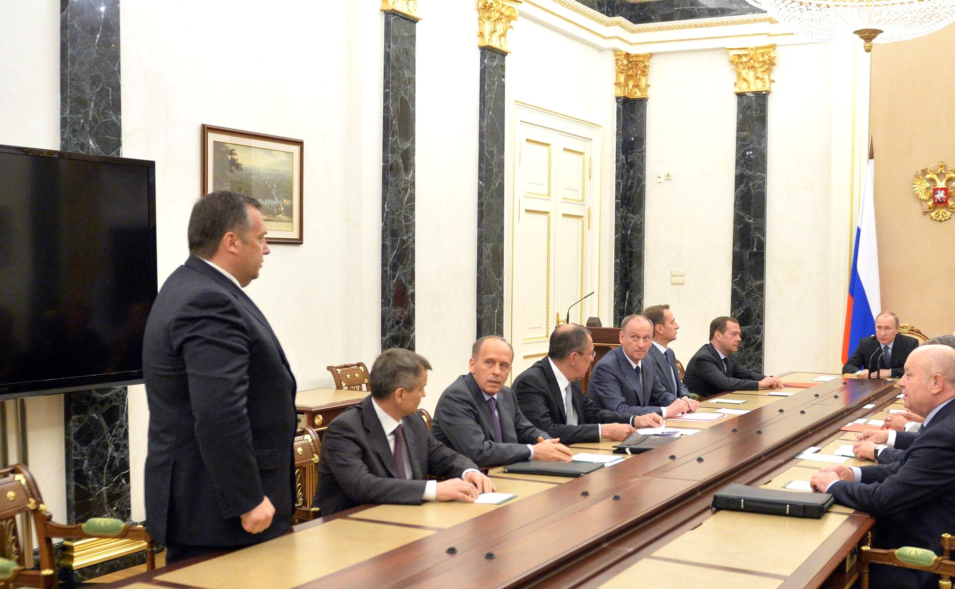 Совещание с постоянными членами Совета Безопасности. Владимир Путин представляет постоянным членам Совета Безопасности нового директора Федеральной службы охраны Дмитрия Кочнева.